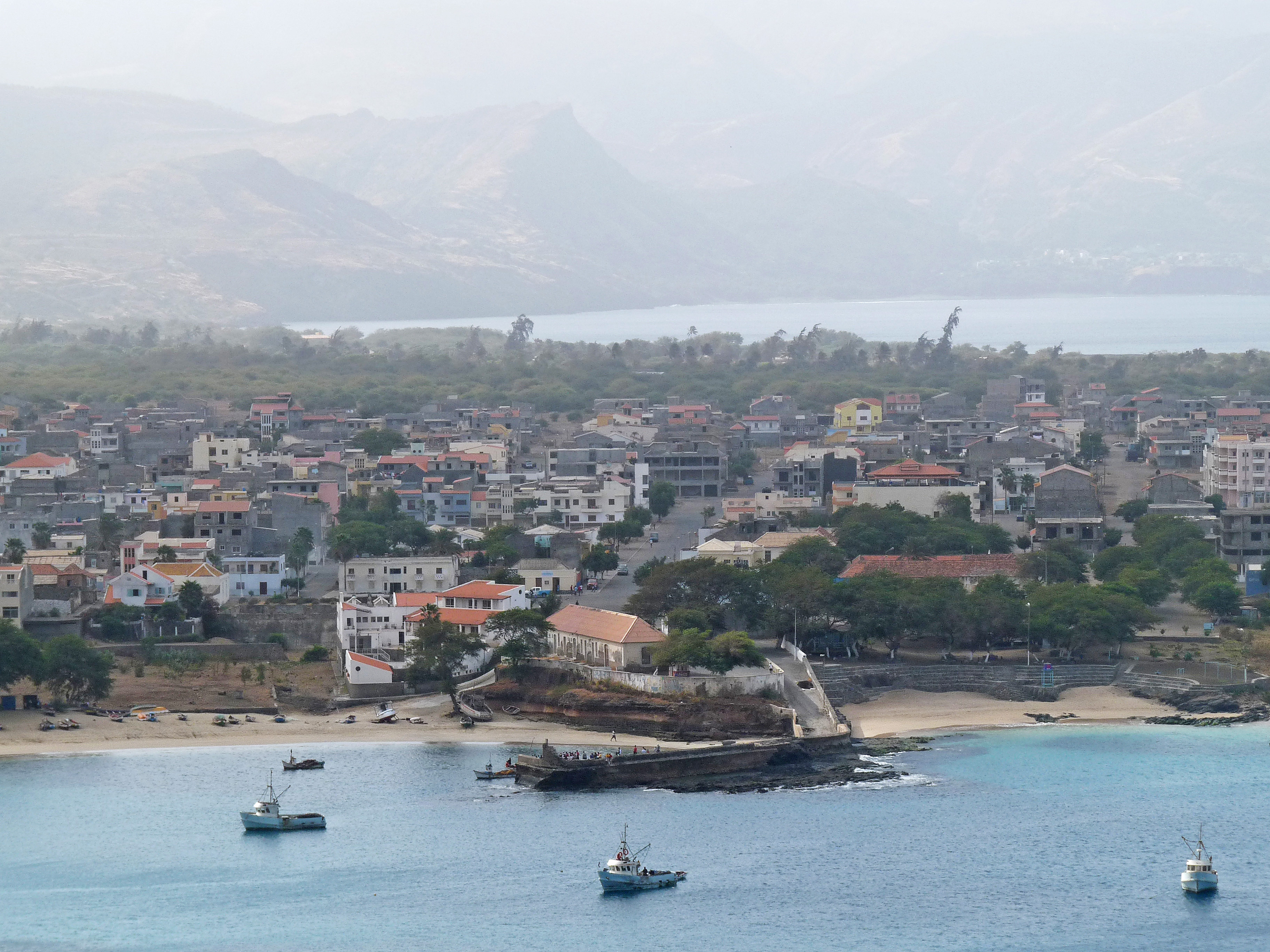 Panorama sur Tarrafal (île de Santiago, Cap-Vert). Au centre le port, à gauche la grande plage, à droite la petite plage